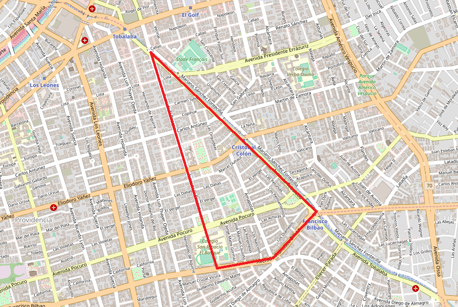 Mapa que muestra la cobertura inicial de TV Cable Intercom al iniciar transmisiones en 1987, comprendido entre las calles Tobalaba, El Bosque y Bilbao. This map may be incomplete, and may contain errors. Don't rely solely on it for navigation.